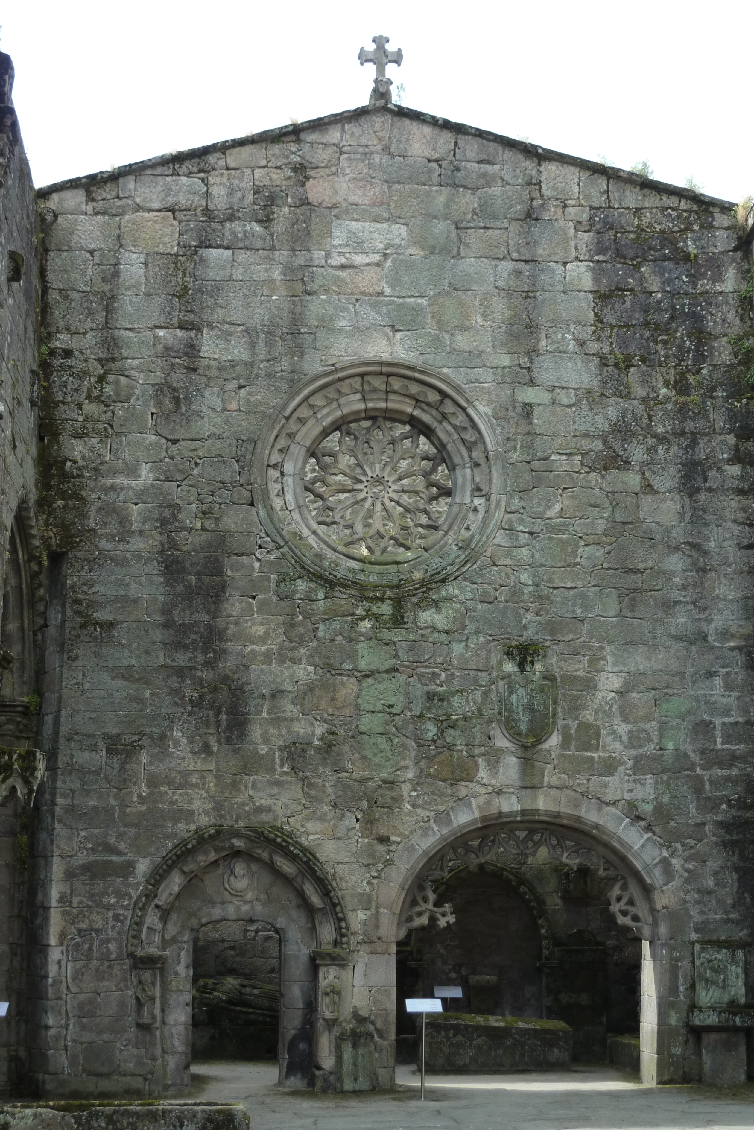 Kirche Santo Domingo in Pontevedra